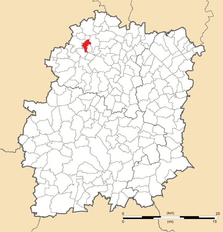 Carte de position de Bures-sur-Yvette en Essonne